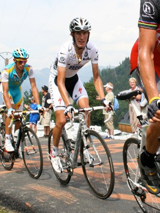 Армстронг, Шлек, Контадор и Бассо взбираются в гору на 9-м этапе Тур де Франс 2010